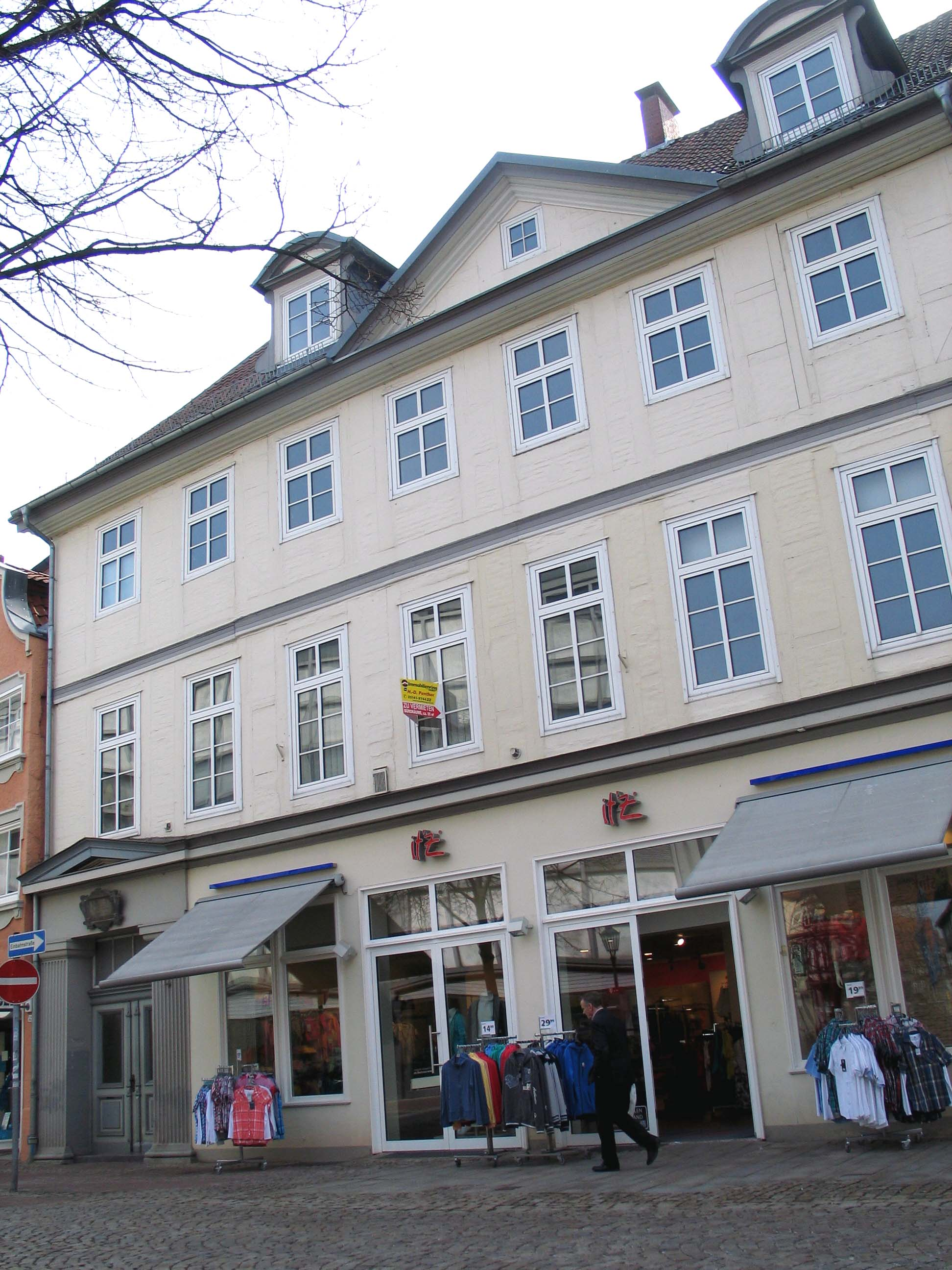 Das Gebäude am Robert-Meyer-Platz 1 (früher: Großer Plan) in Celle war Geburts- und Sterbehaus für den Dichter der sogenannten "bezauberten Rose", Ernst Schulze (1789-1817) ...